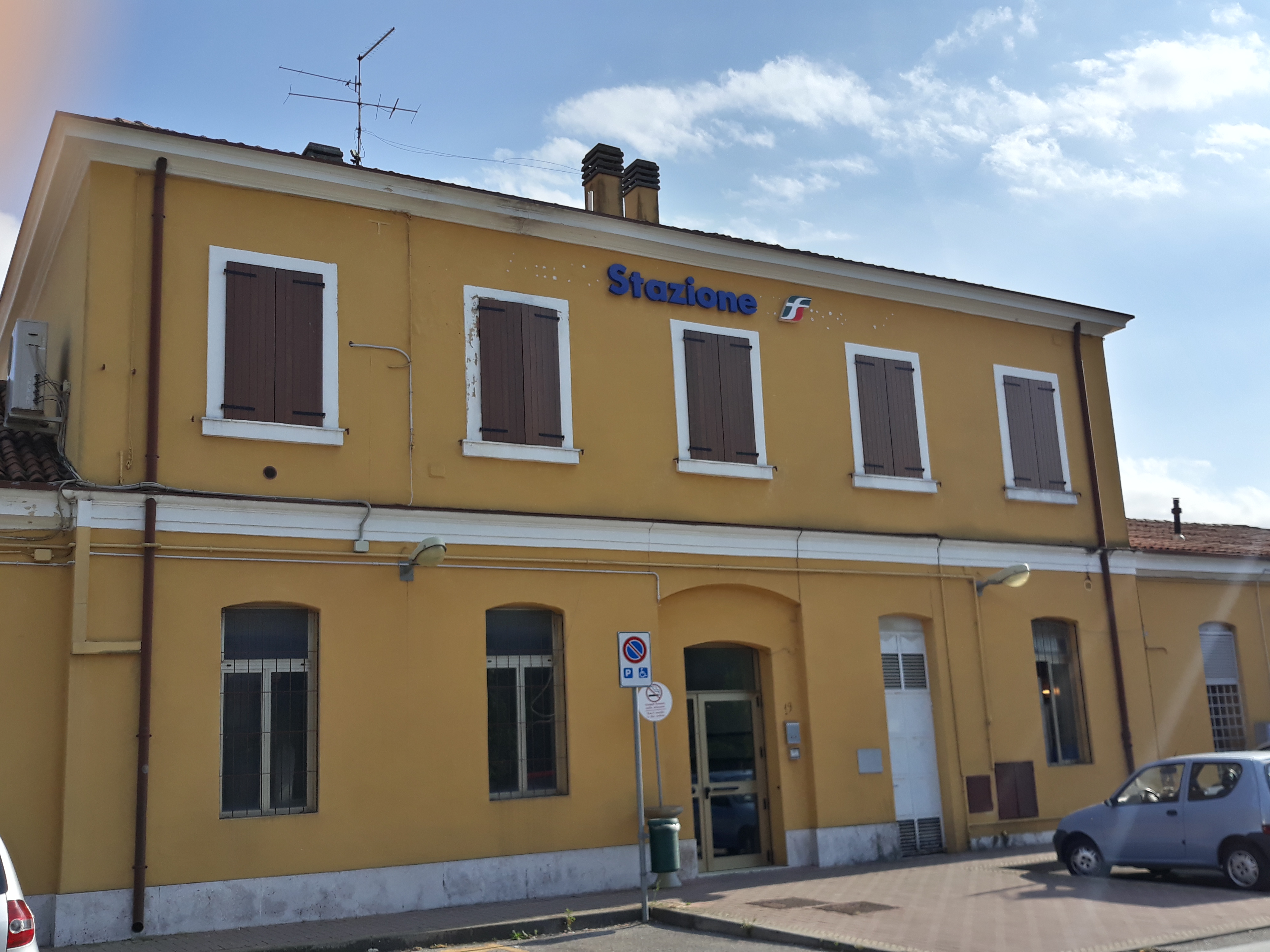 Fabbricato viaggiatori della stazione ferroviaria di San Martino Buonalbergo